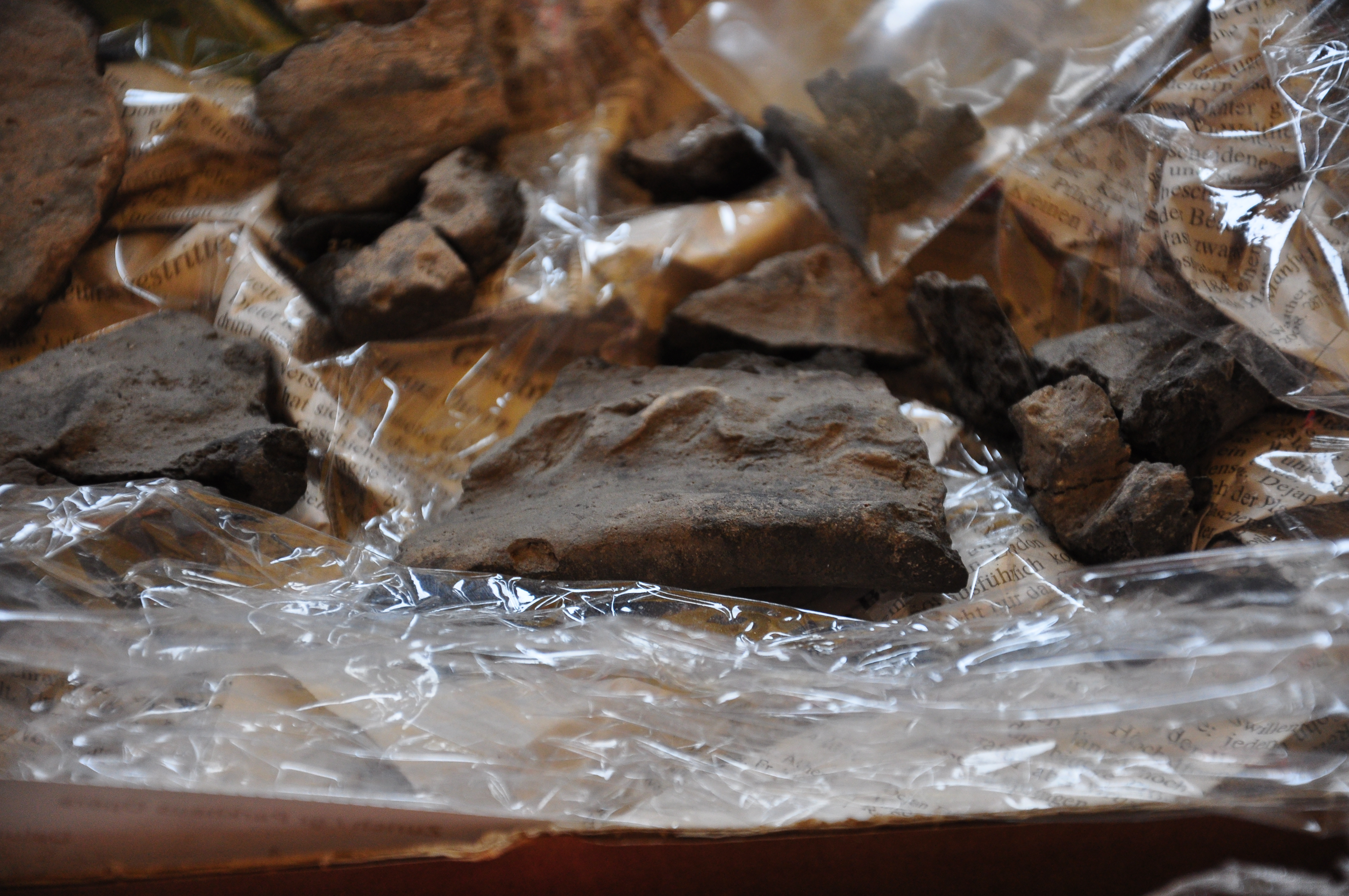 Archäologische Grabung Parkhaus Opéra in Zürich (Switzerland) : Keramikscherben der Schnurkeramik Kultur